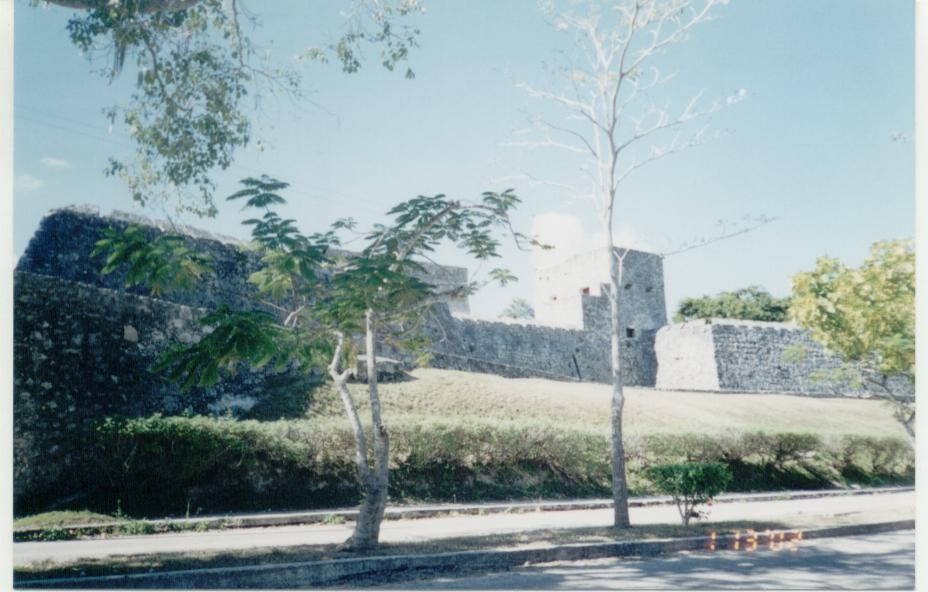 Fuerte de San Felipe, Bacalar, Quintana Roo, México